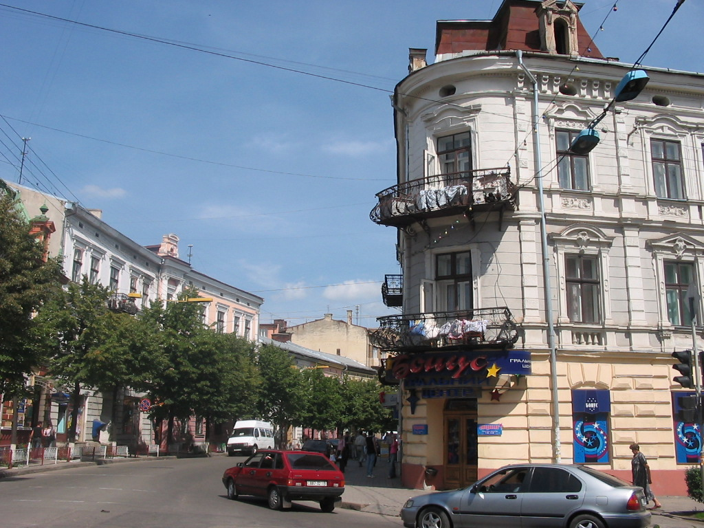 Downtown Ivano-Frankivsk